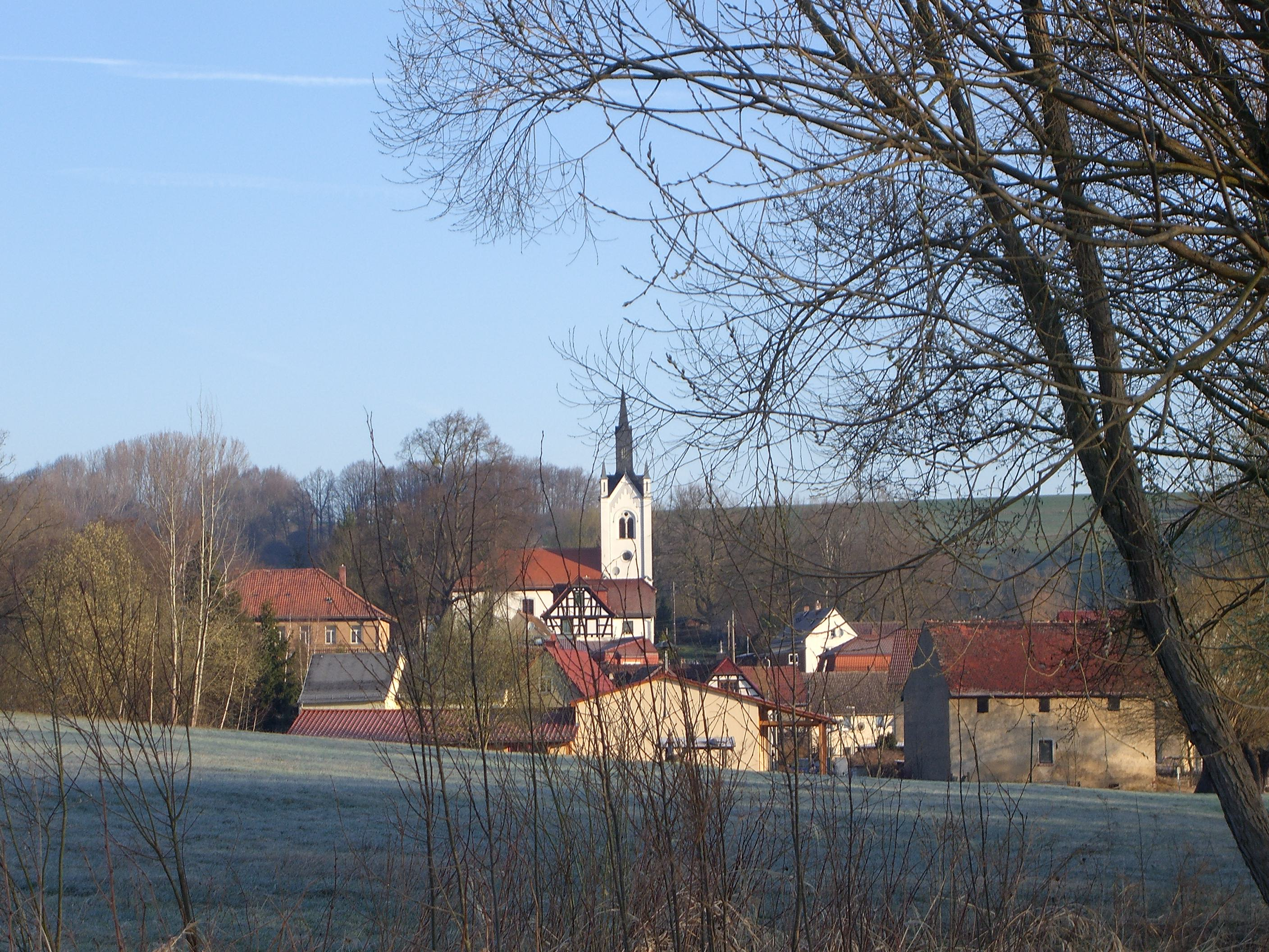 Blick vom Stausee zur Dorfmitte